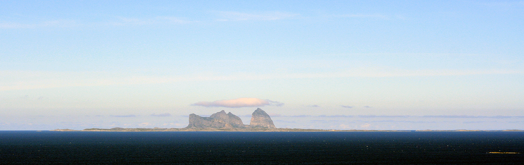 Træna, Nordland, Norway. Seen from Lovunden.